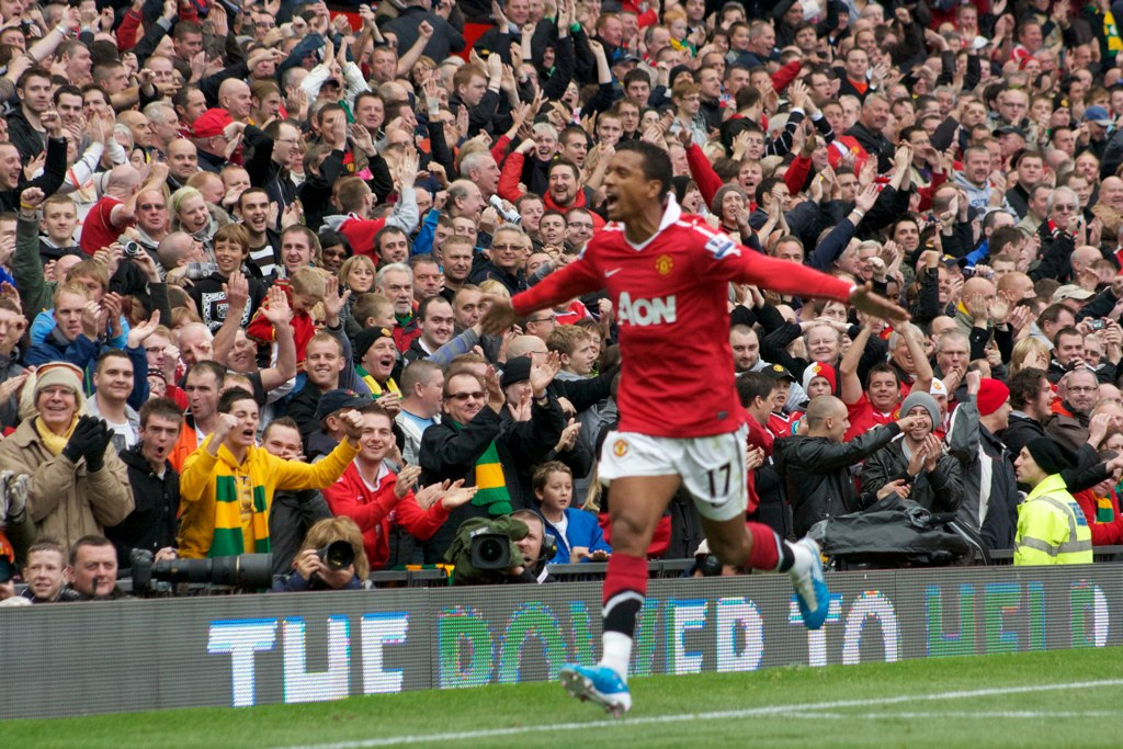 Nani vs West Brom